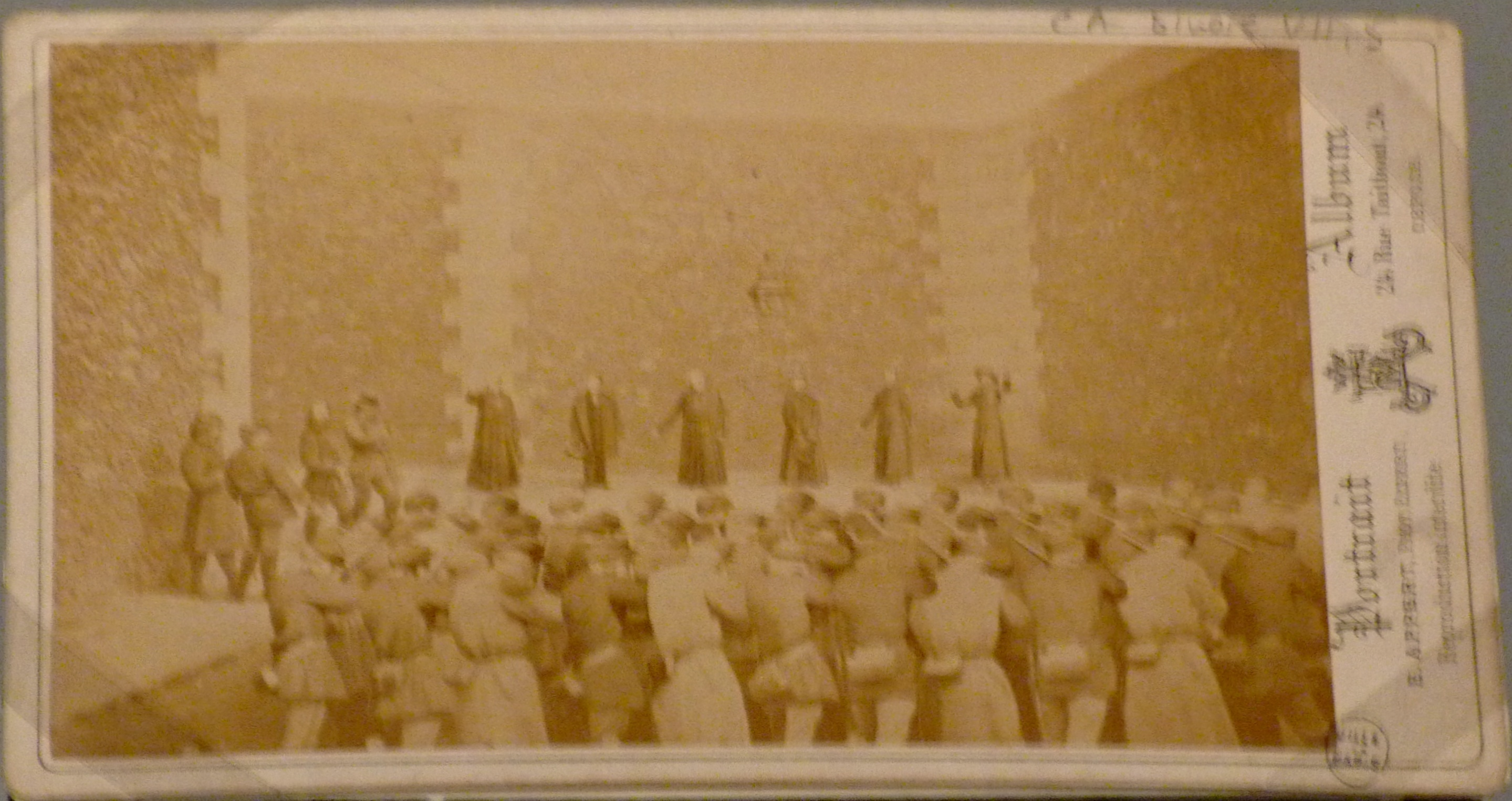 Exposition La Commune de Paris à l'Hôtel de Ville de Paris (18 mars - 28 mai 2011) - 24 mai : exécution de six otages dans la cour de la prison de la Roquette- Photomontage d'Eugène Appert - Bibliothèque historique de la Ville de Paris.